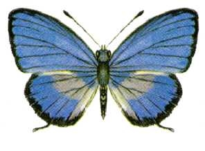 Nacaduba cyanea